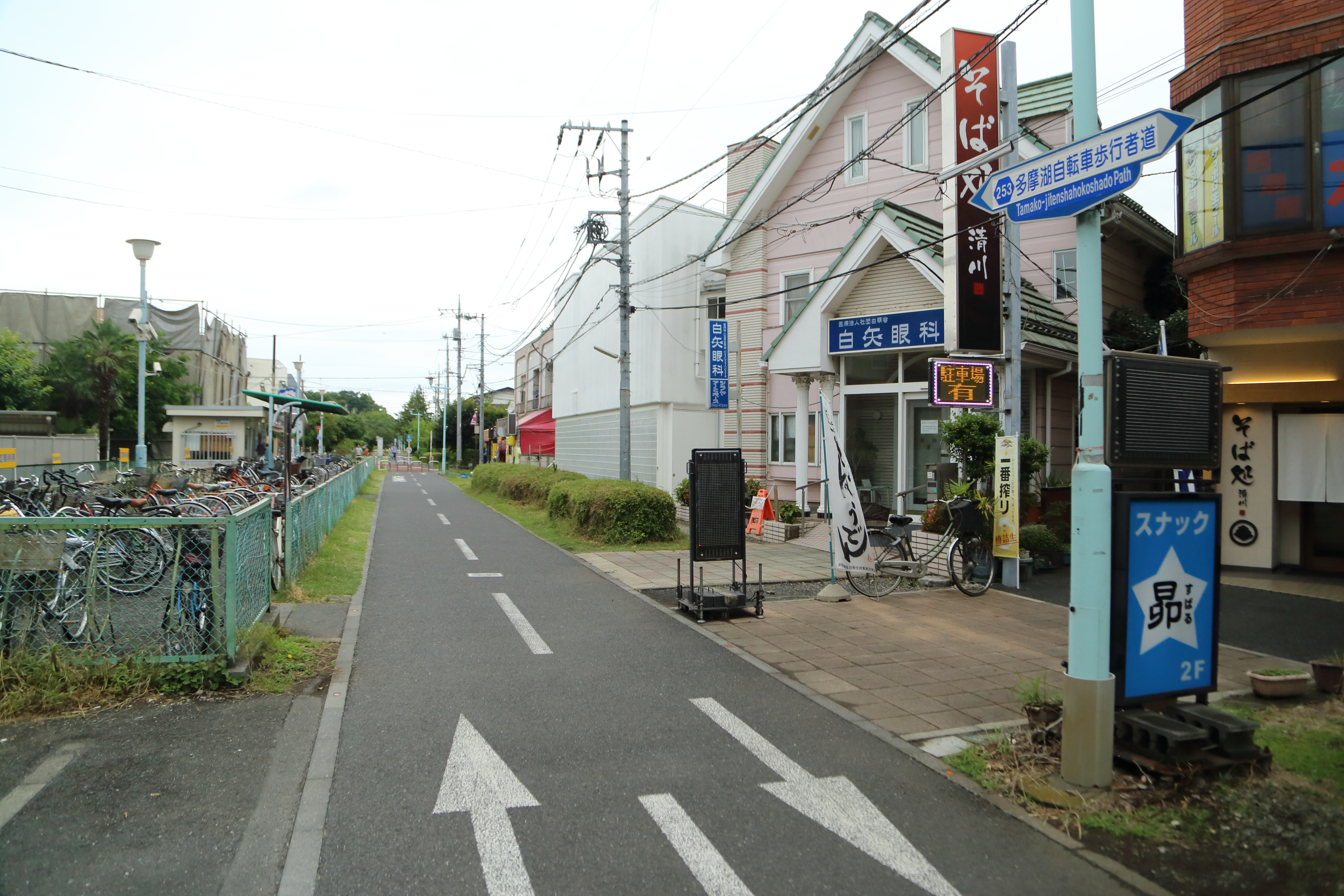 東京都道253号保谷狭山自然公園自転車道線。東京都小平市にて2019年6月23日撮影。